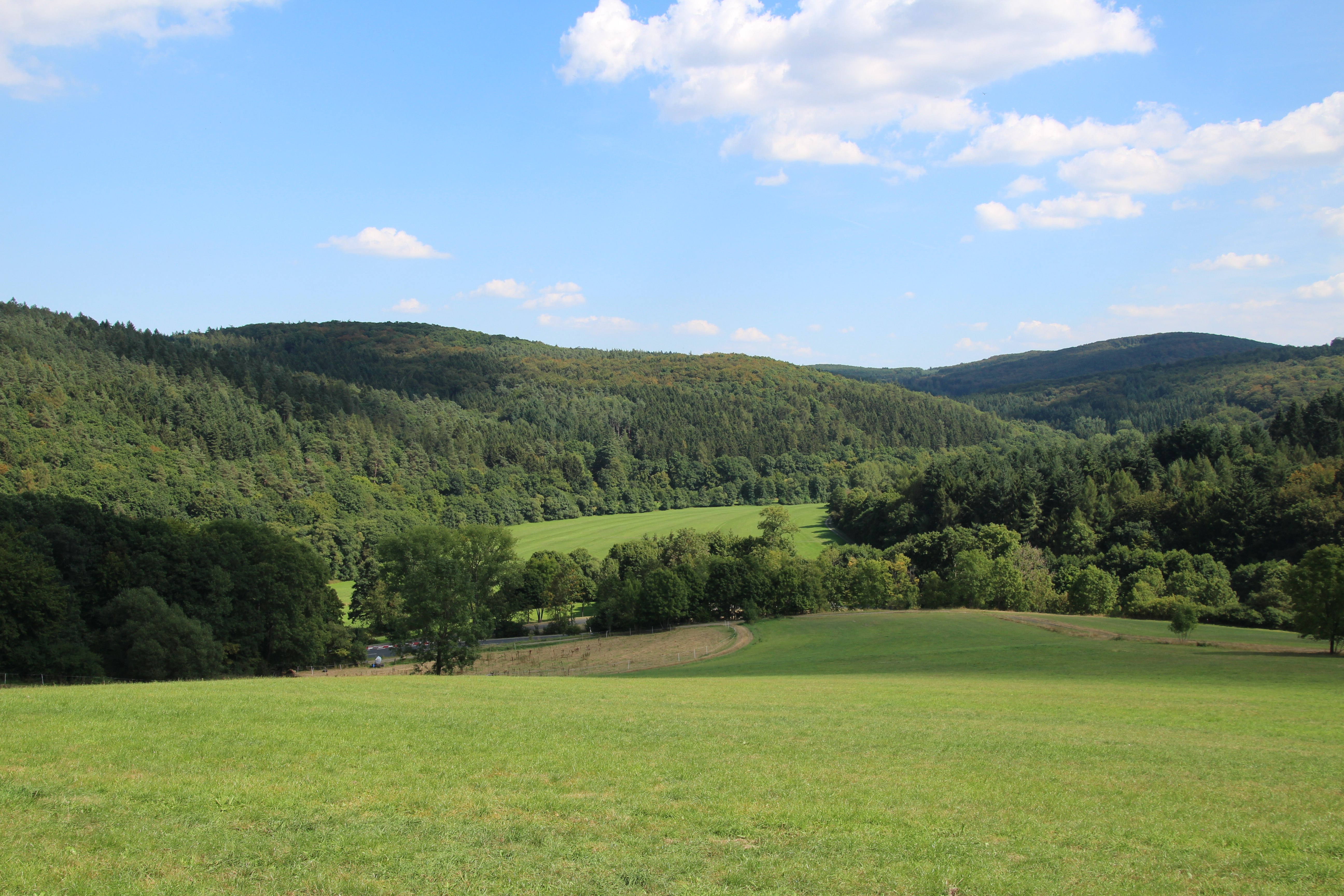 Siehe Bild und Dateiname